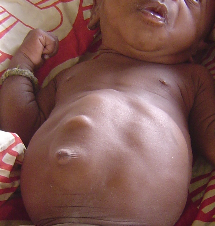 Hernie de la ligne blanche chez un bébé de 3 mois